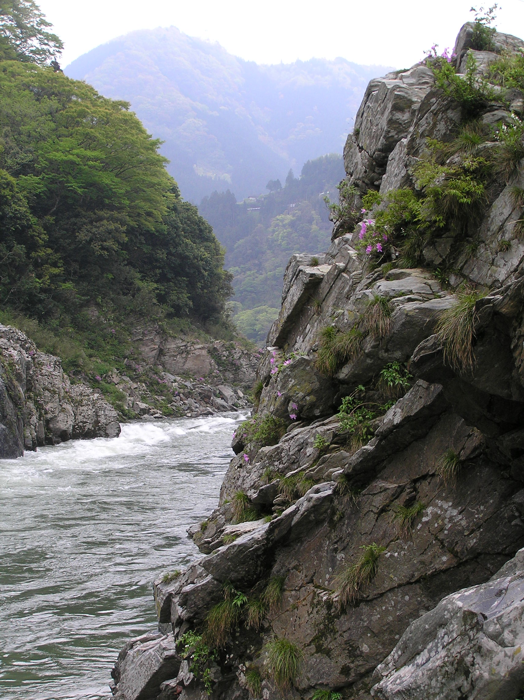 Ōboke gorge in Shikoku, Japan.